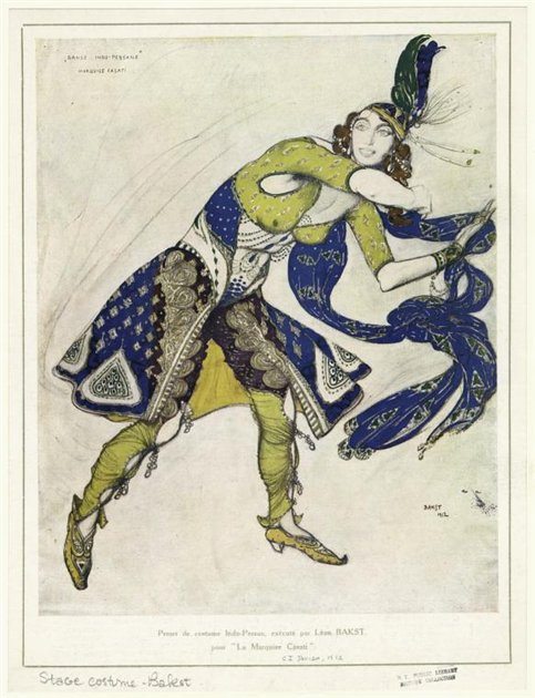 bakst indo-persian dance 1912